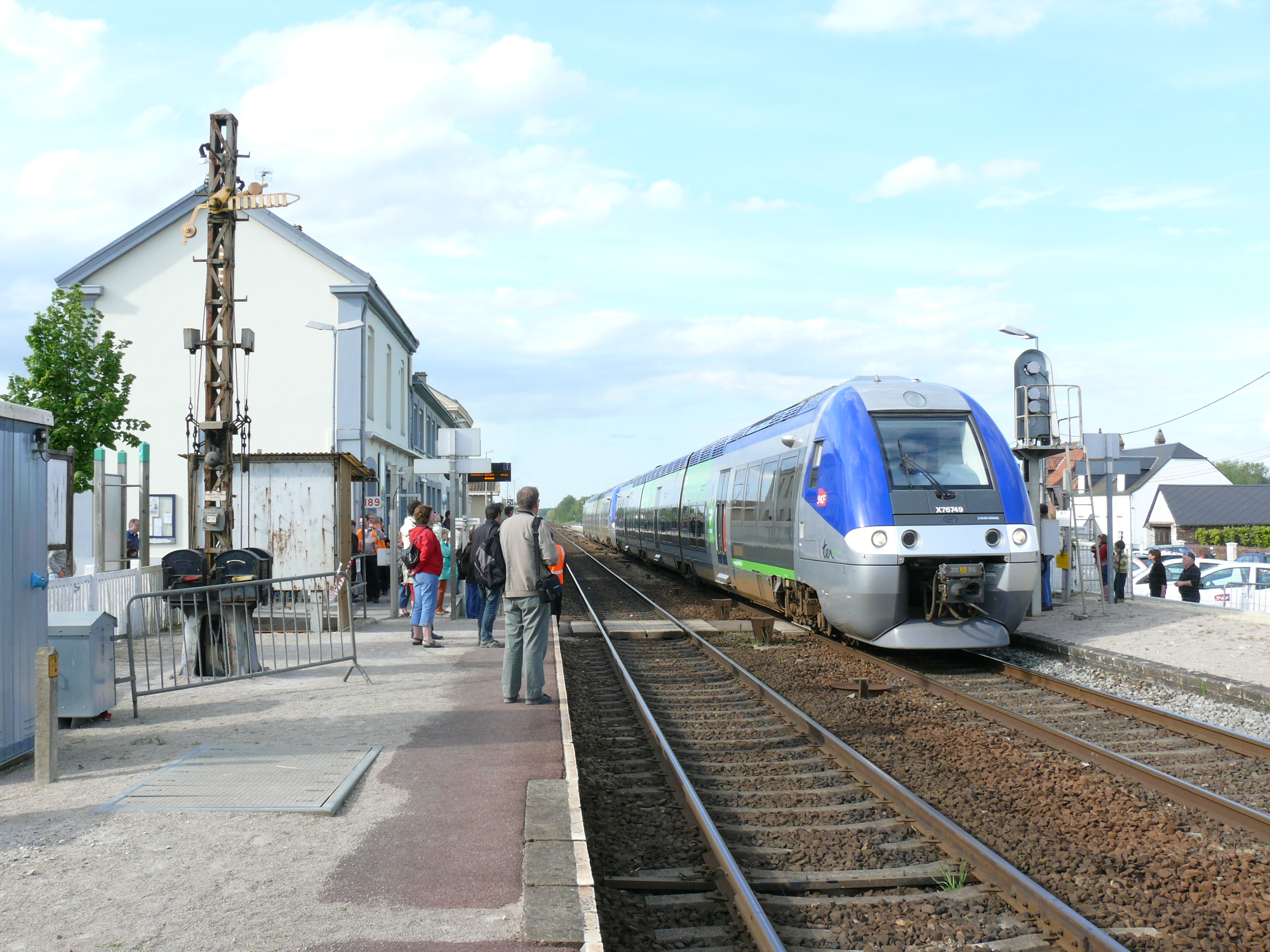 Gare de Noyelles (Ligne Longueau - Calais Rame X76749 (TER Picardie) Noter l'électrosémaphore Lartigue Nord sur le quai de gauche, dont le mécanisme assure toujours la sécurité des circulations